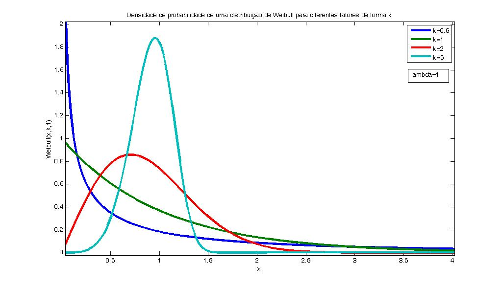 grafico da distribuição de weibull para diferentes parametros de forma e parametro de escala constante igual a 1